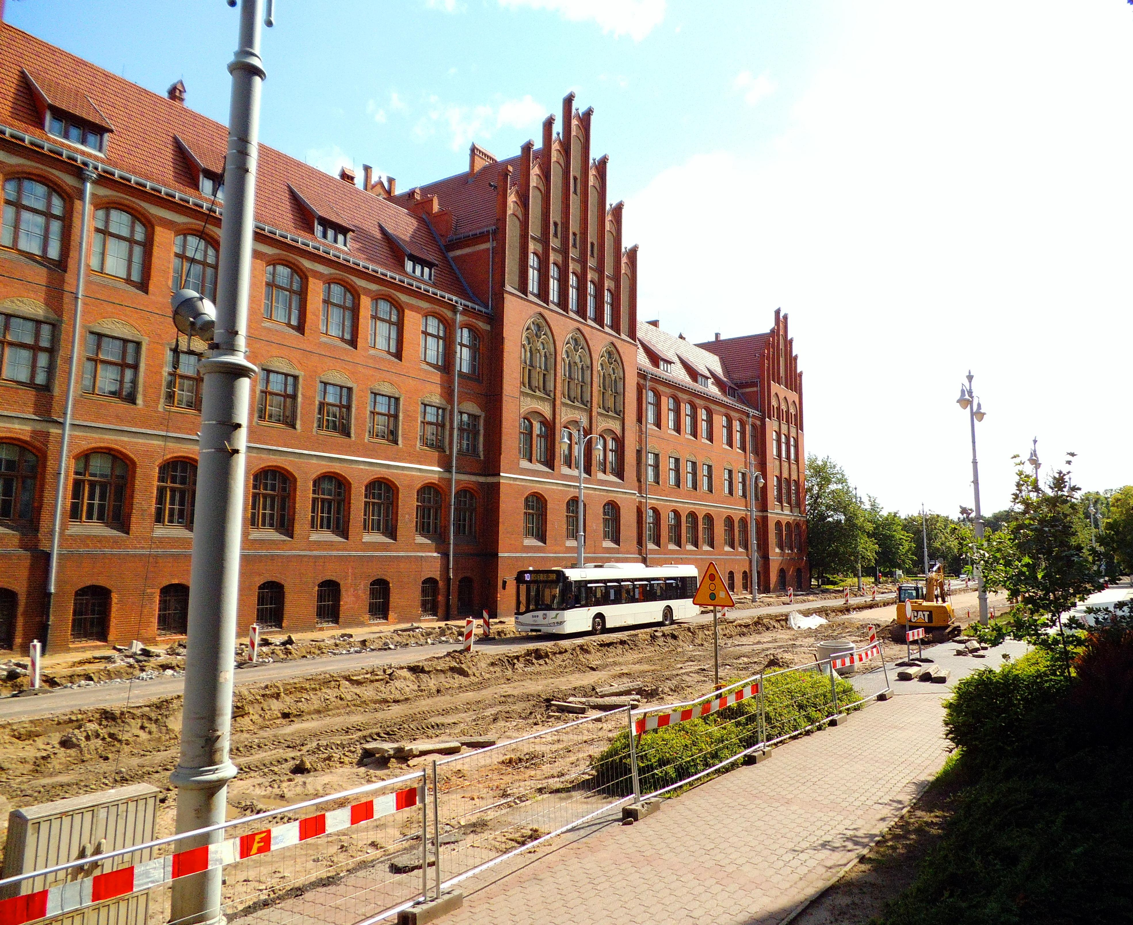 Wały gen. Władysława Sikorskiego w Toruniu 2019